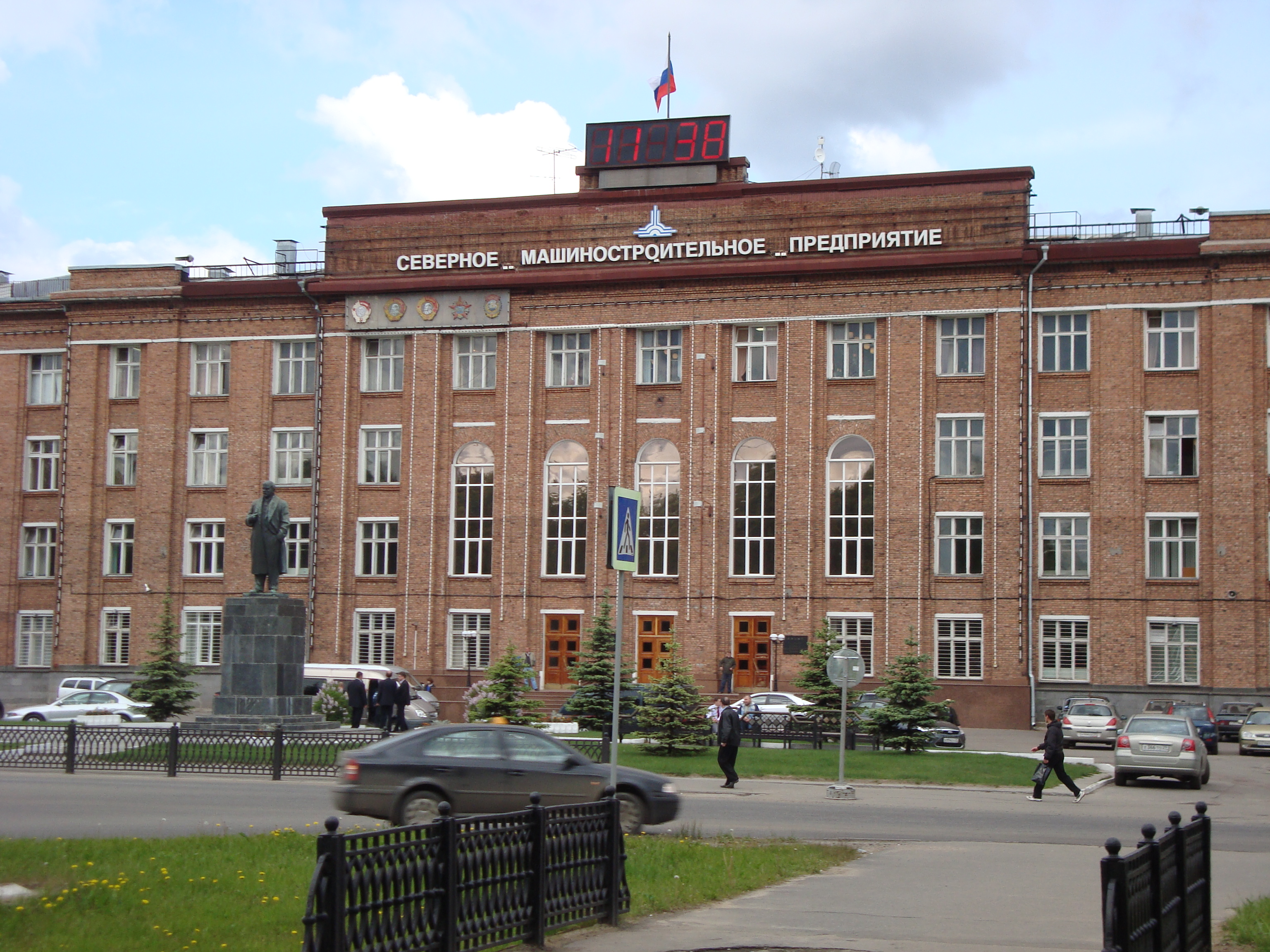 Здание заводоуправления «Севмаш». Под названием слева размещены заслуженные предприятием ордена.